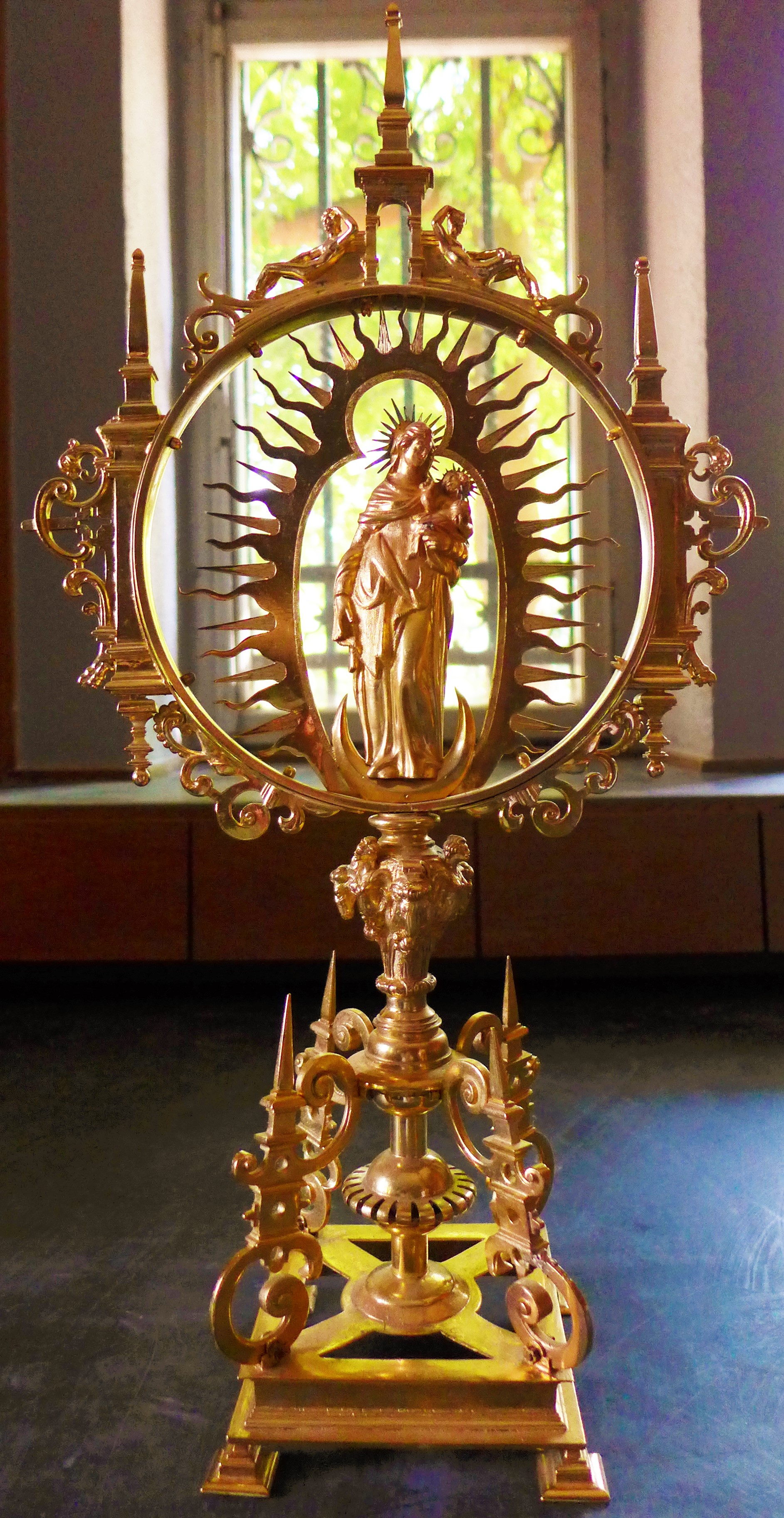 St. Josef (Saarbrücken), Neorenaissance-Marienplastik